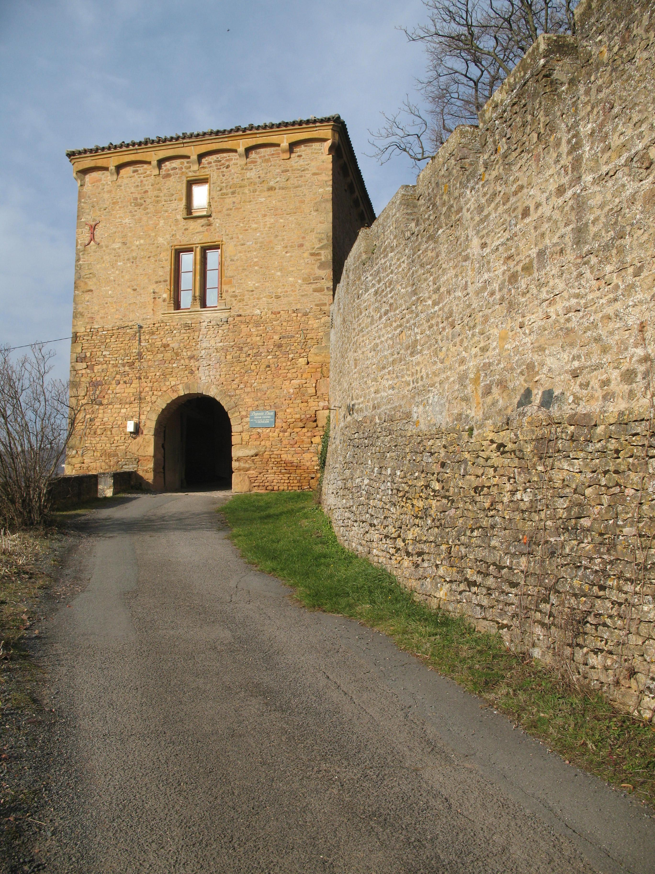 Château de Montmelas dans le Rhône